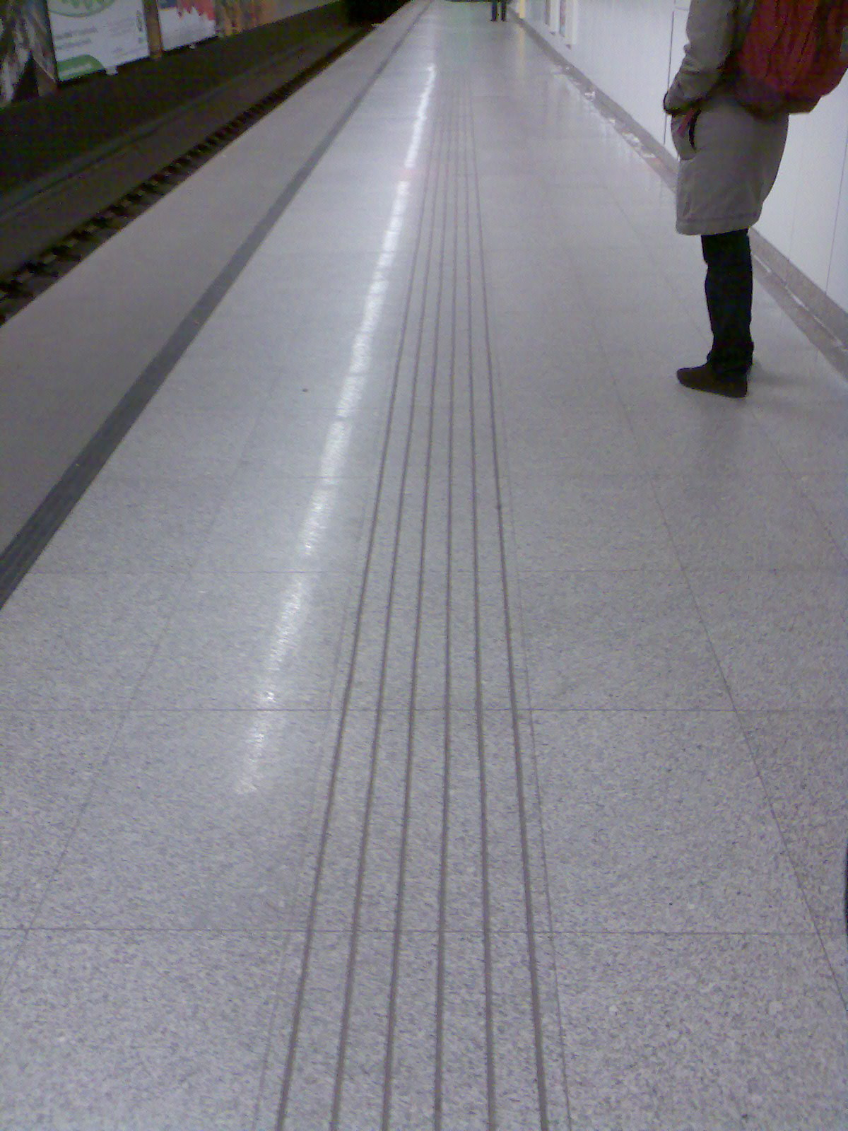 2-es metró Blaha Lujza téri állomásán. Vakvezető sáv